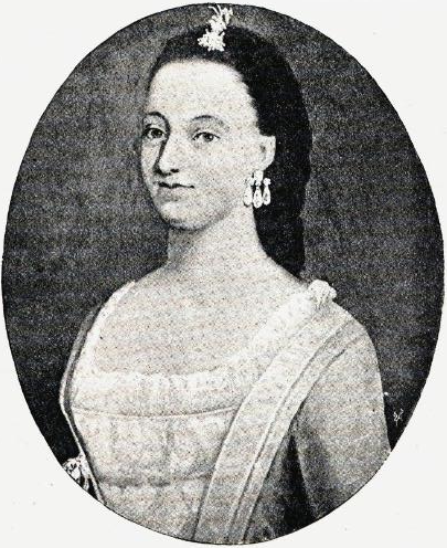 Matthia Anker f. Collett, gift med Bernt Anker. «Efter et Maleri, tilhørende Bureauchef A. Collett.»